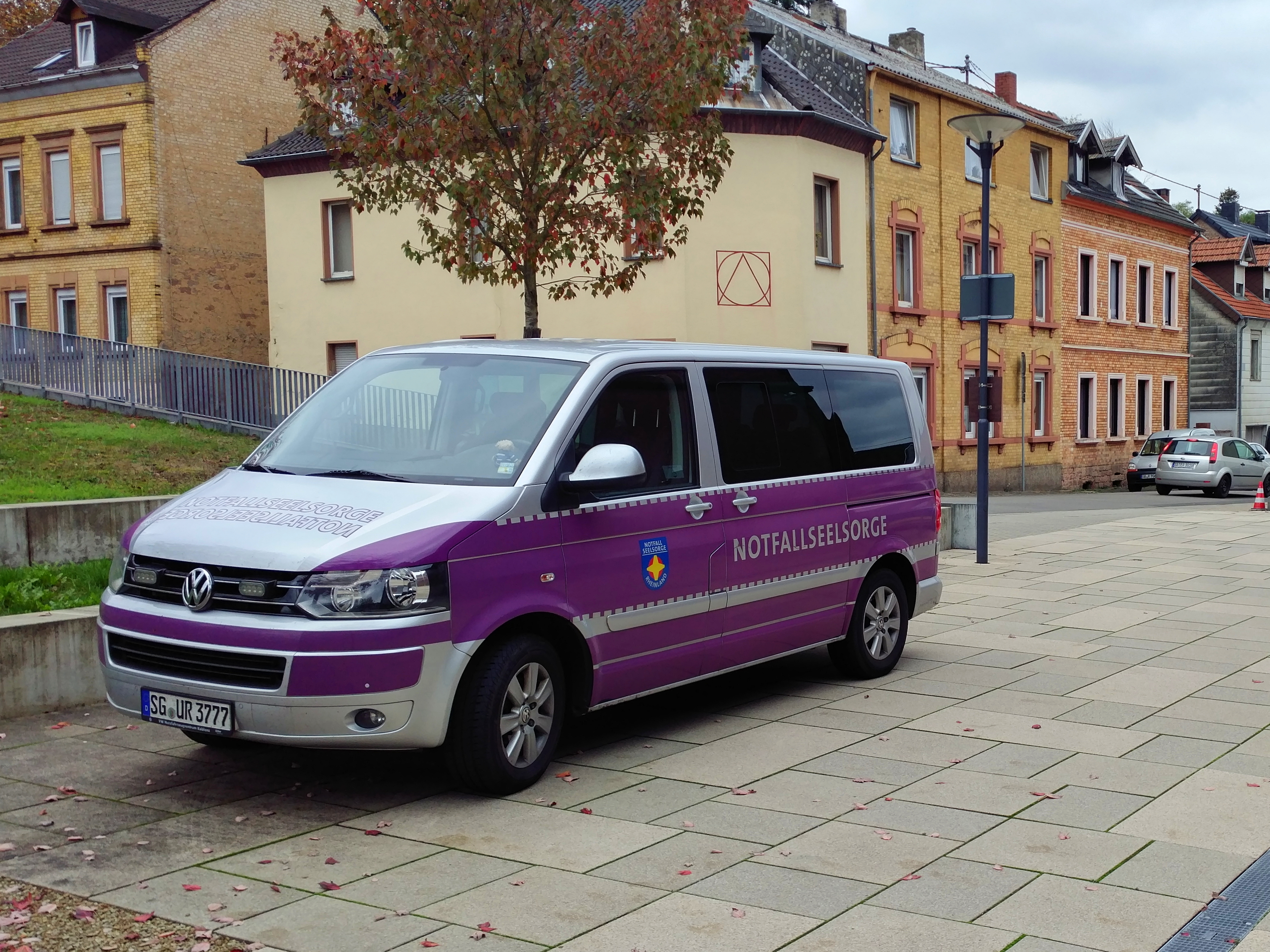 Die Evangelische Kirche im Rheinland stellt einigen hauptamtlichen Mitarbeitern der Notfallseelsorge ein lilafarbenes Einsatzfahrzeug zur Verfügung.